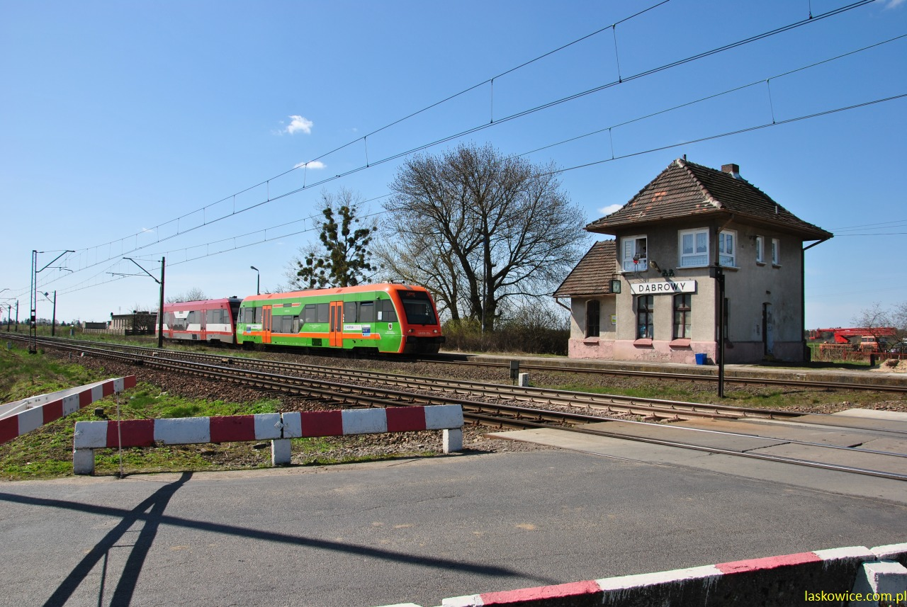 Szynobusy do Czerska w Dąbrowie.